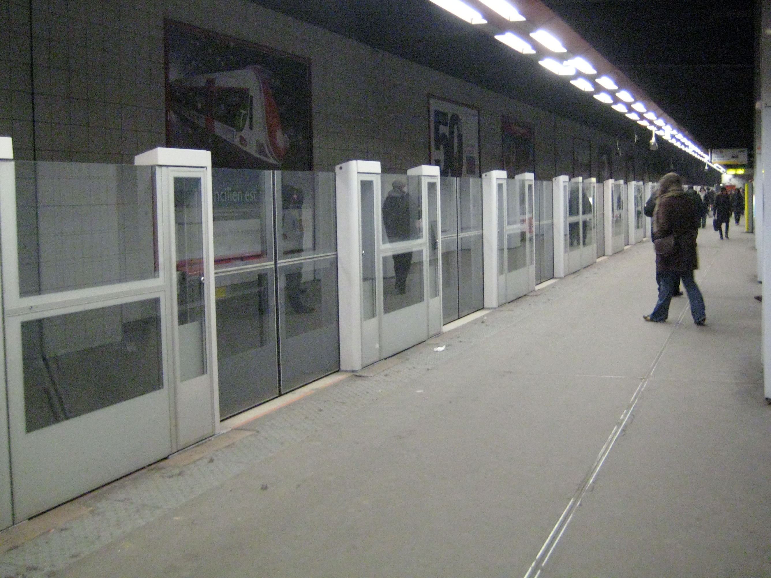 Station Grande-Arche de La Défense, Ligne 1 métro de Paris. (quai direction Vincennes)